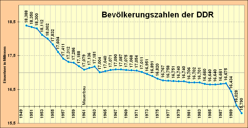 Bevölkerungsentwicklung in der DDR, graphisch und mit Bevölkerungzahlen